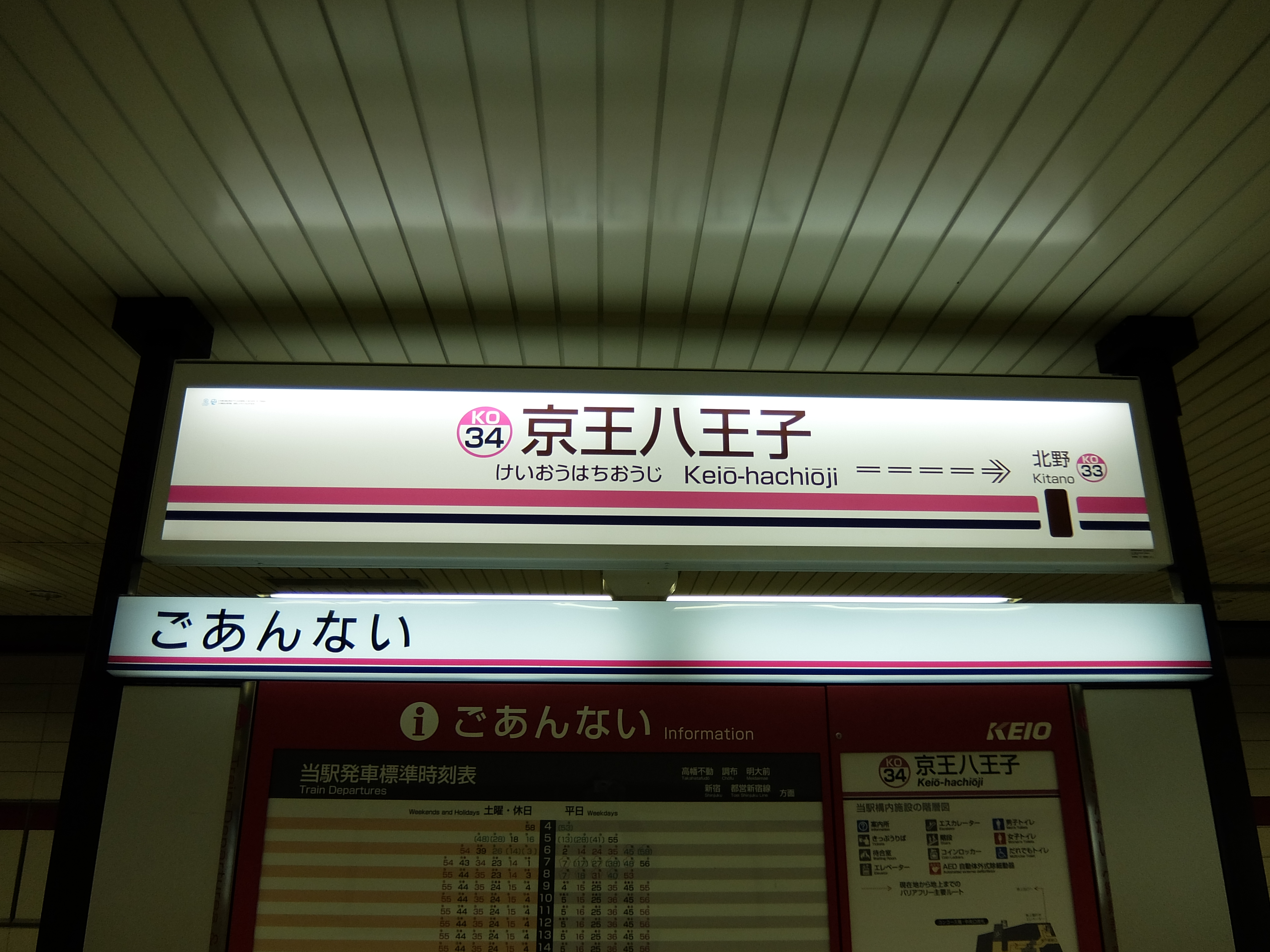 京王八王子駅 駅名看板